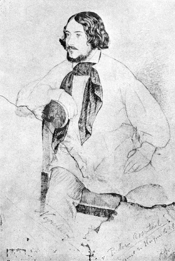 RosenthalINegulici